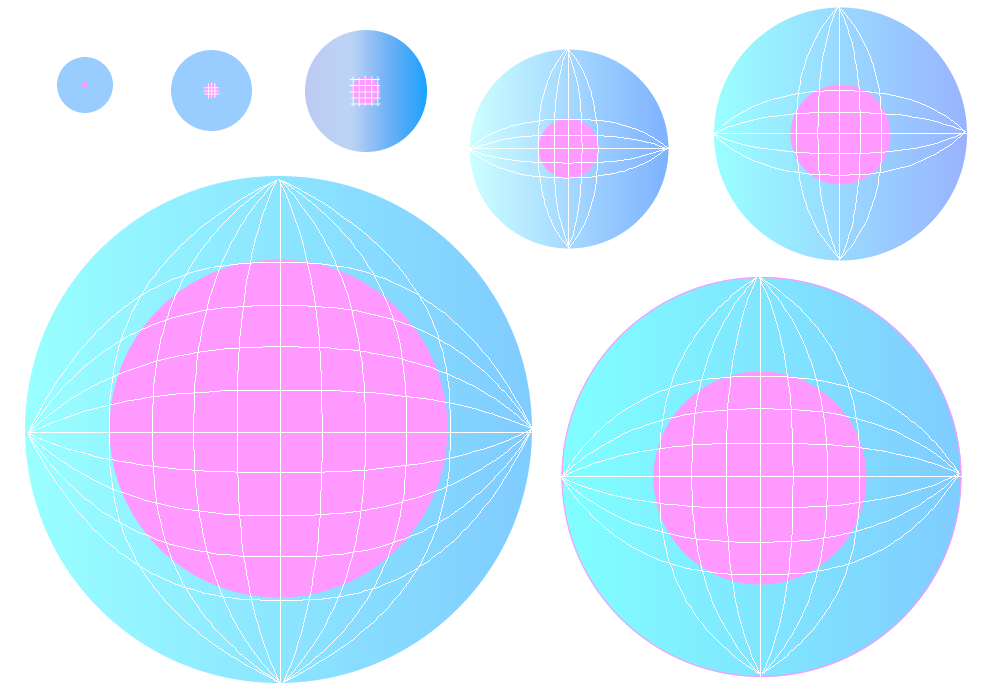 Illustration courbure univers